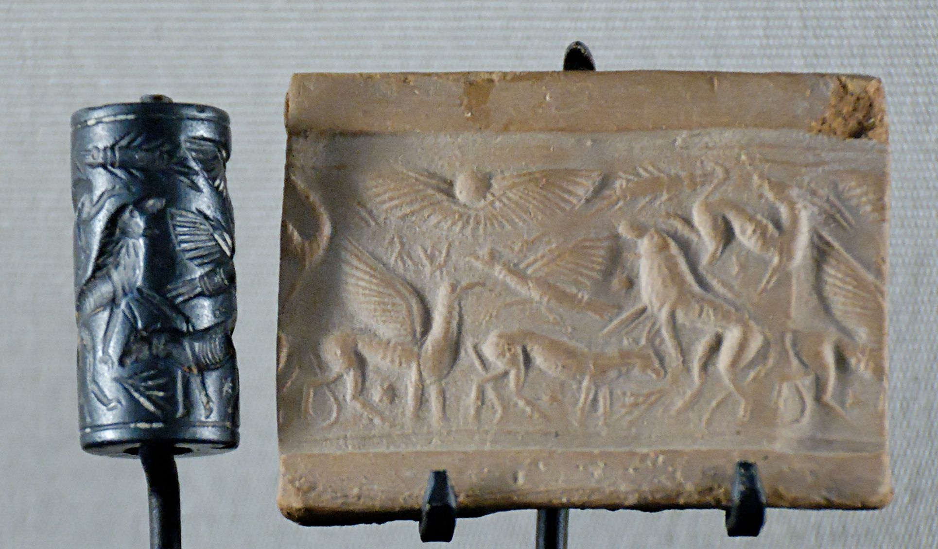 Provenance: Cyprus